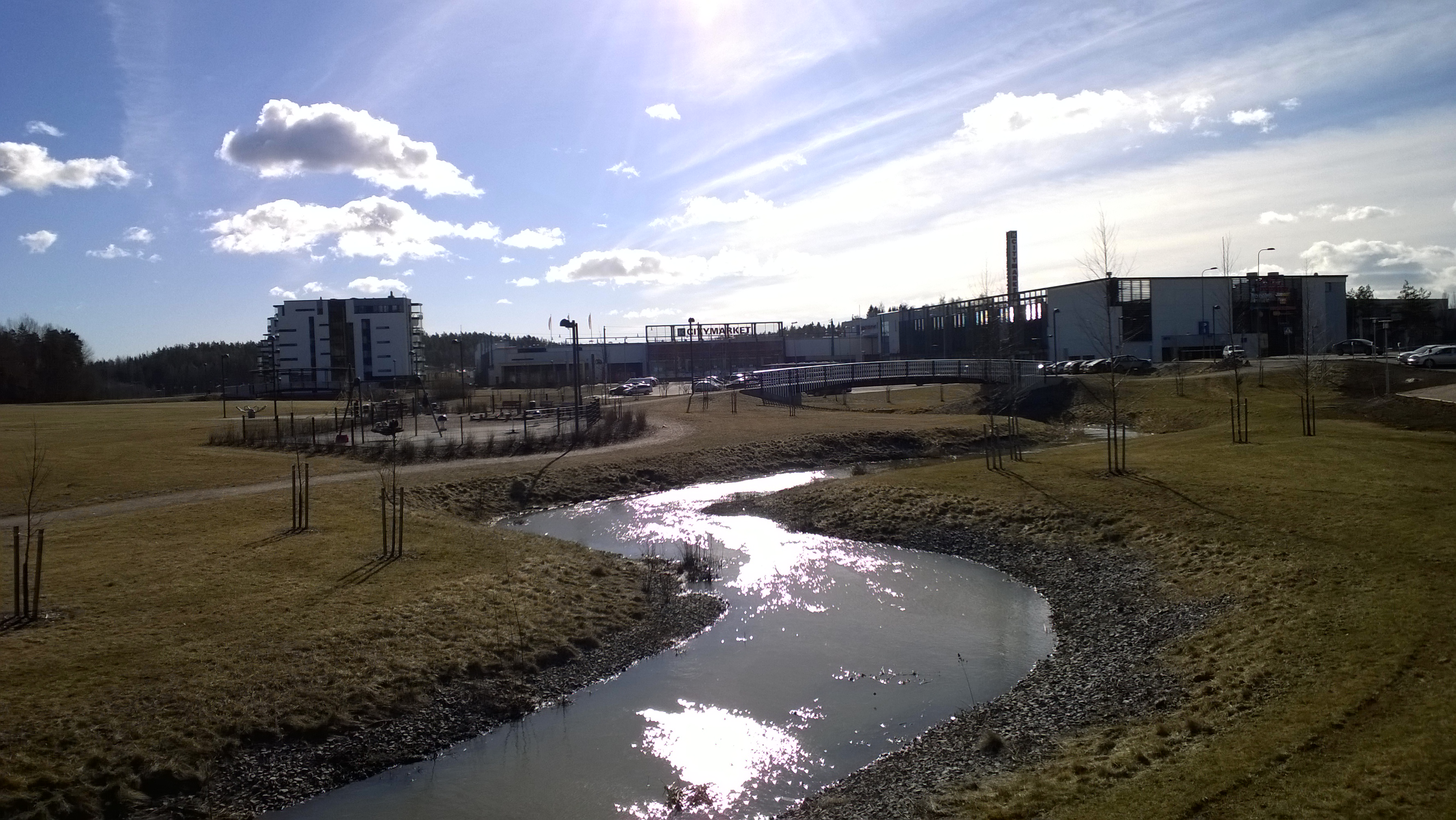 Kirkkolaakso maaliskuussa 2014.